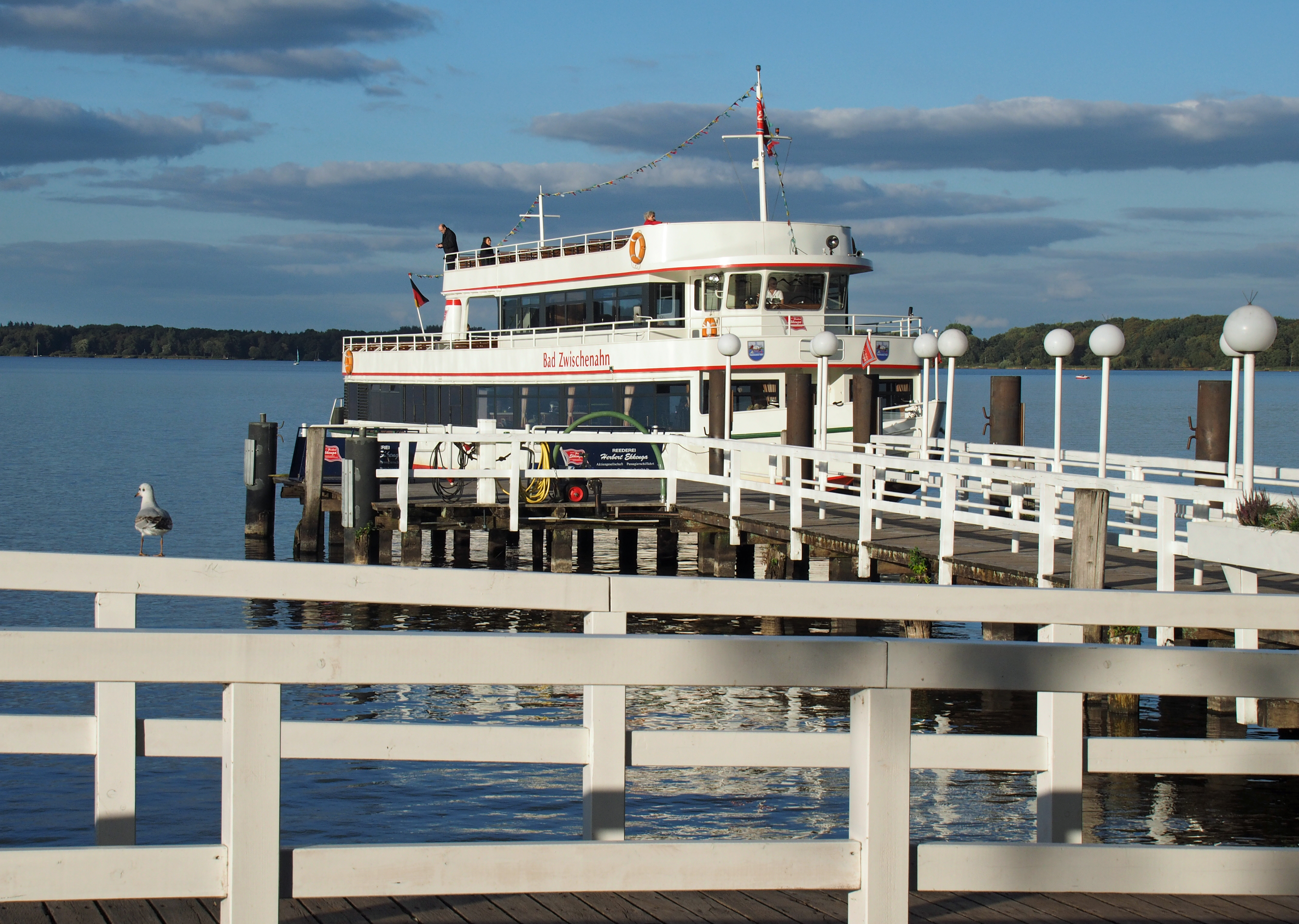 Schiff „Bad Zwischenahn“ der „Weissen Flotte Bad Zwischenahn“ am Fähranleger am Zwischenahner Meer